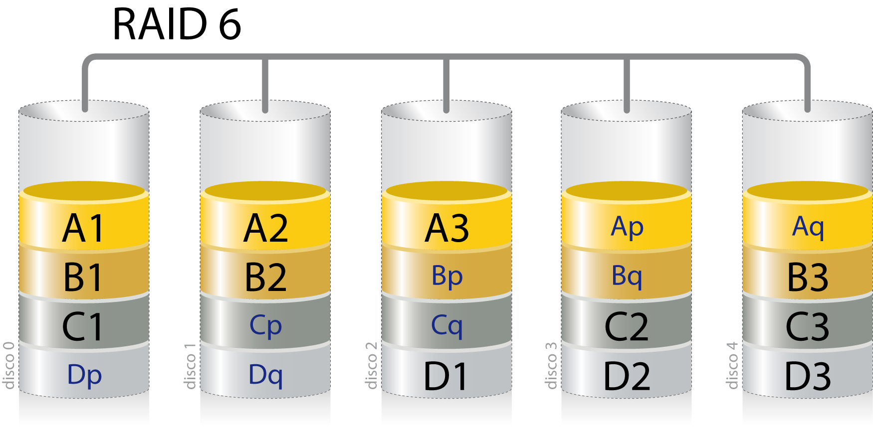 Esquema RAID 6